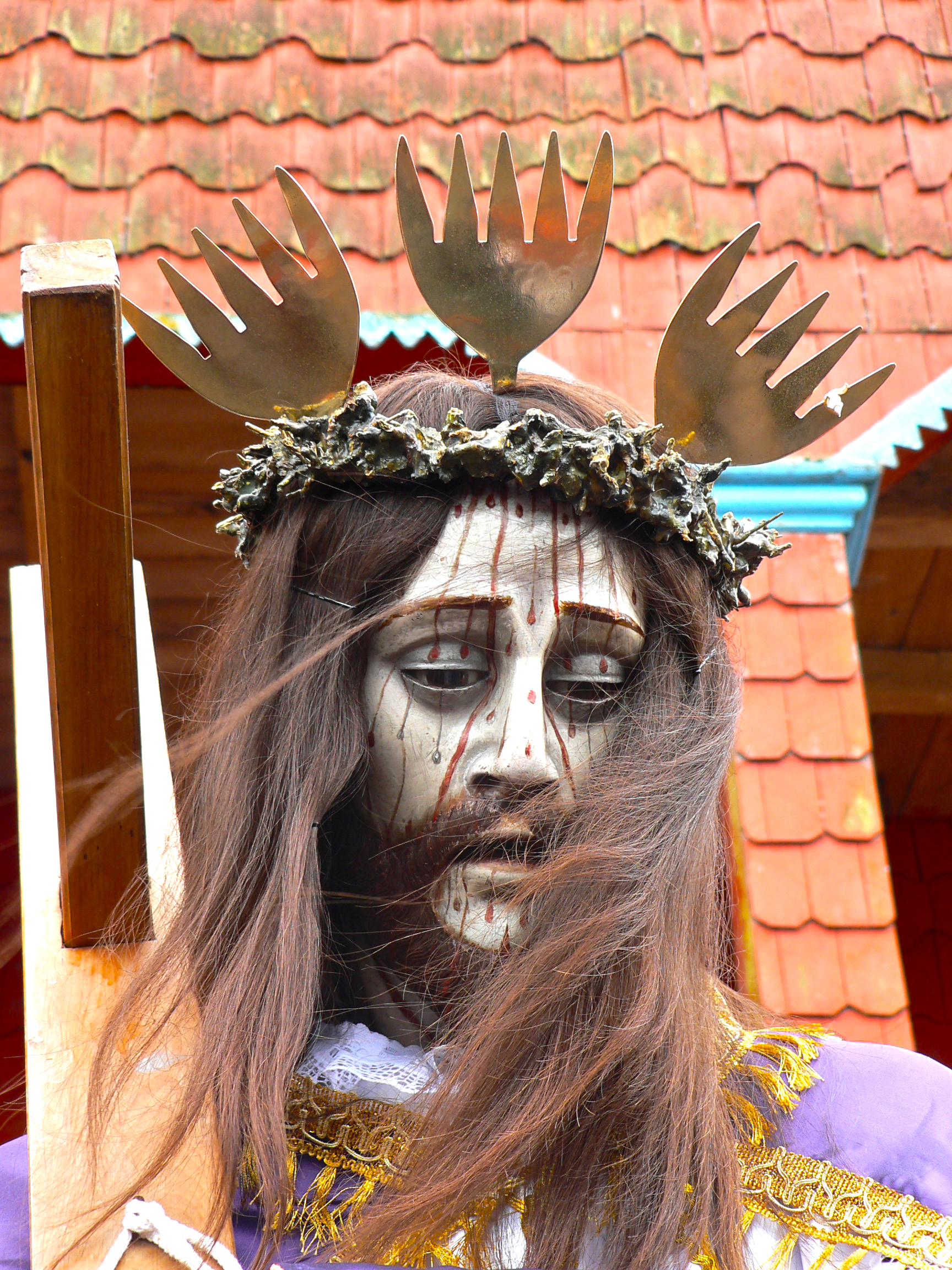 Iglesia de Caguach e imaginería (Jesús Nazareno) This is a photo of a national monument in Chile: 479